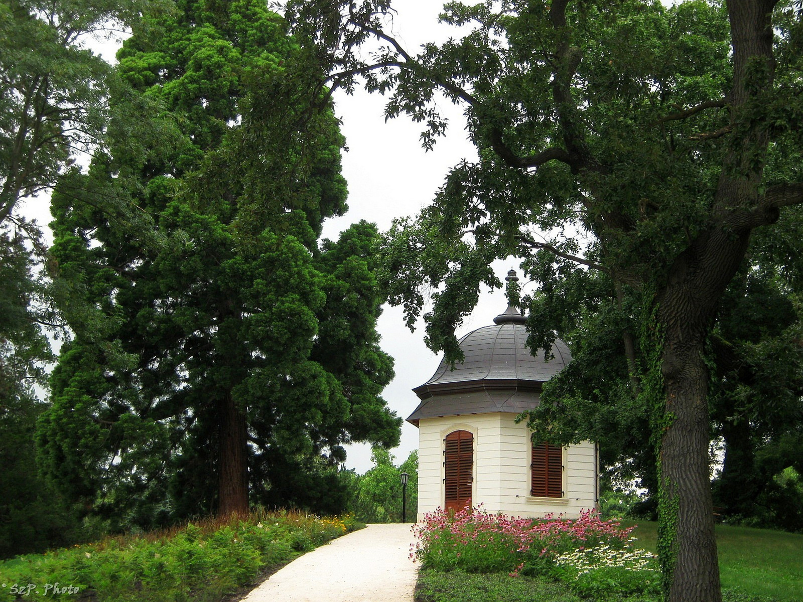 Grassalkovich-kastély kerti pavilonja (Gödöllő, Szabadság tér 1.)